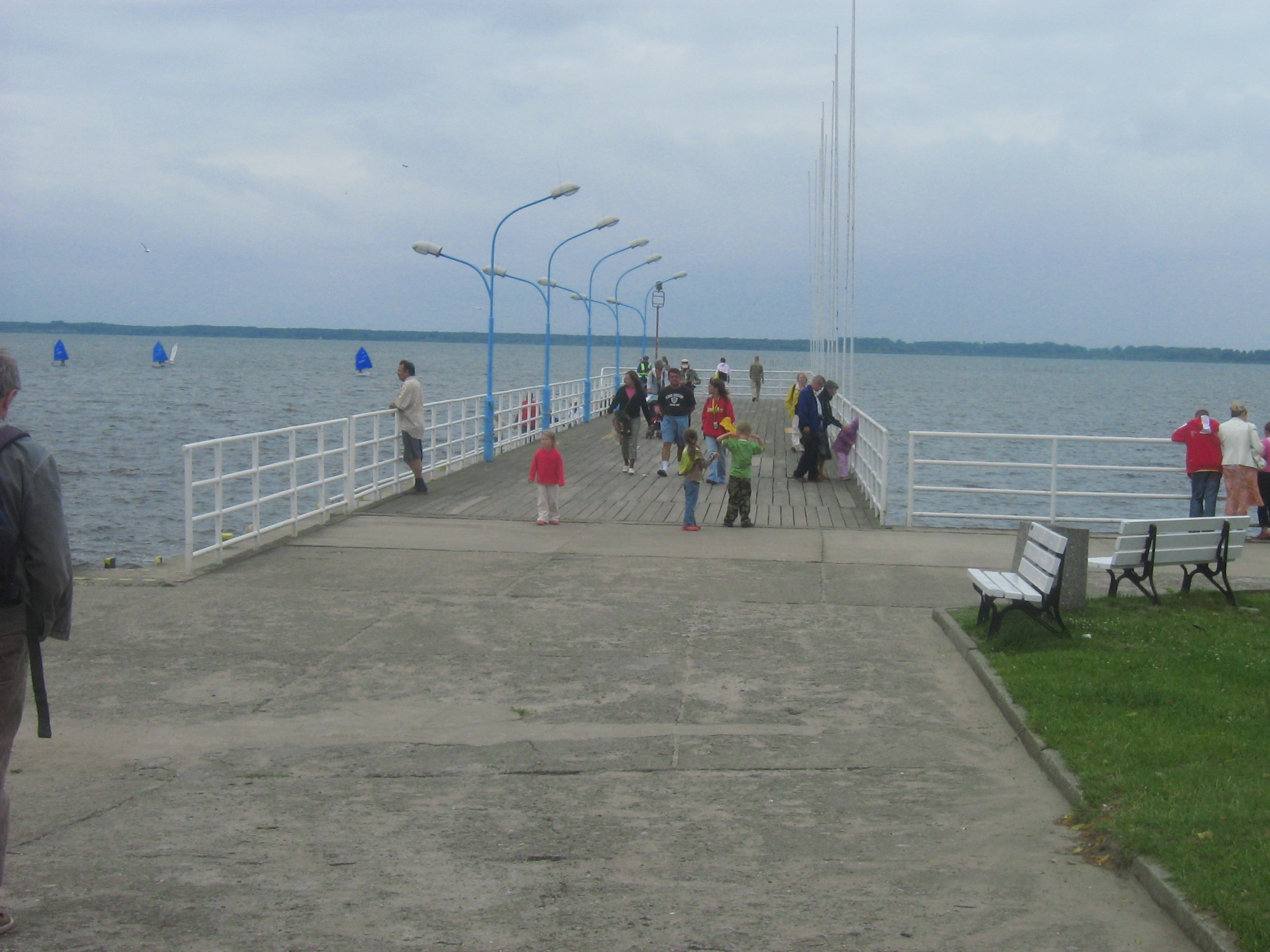 Molo w Kamieniu Pomorskim